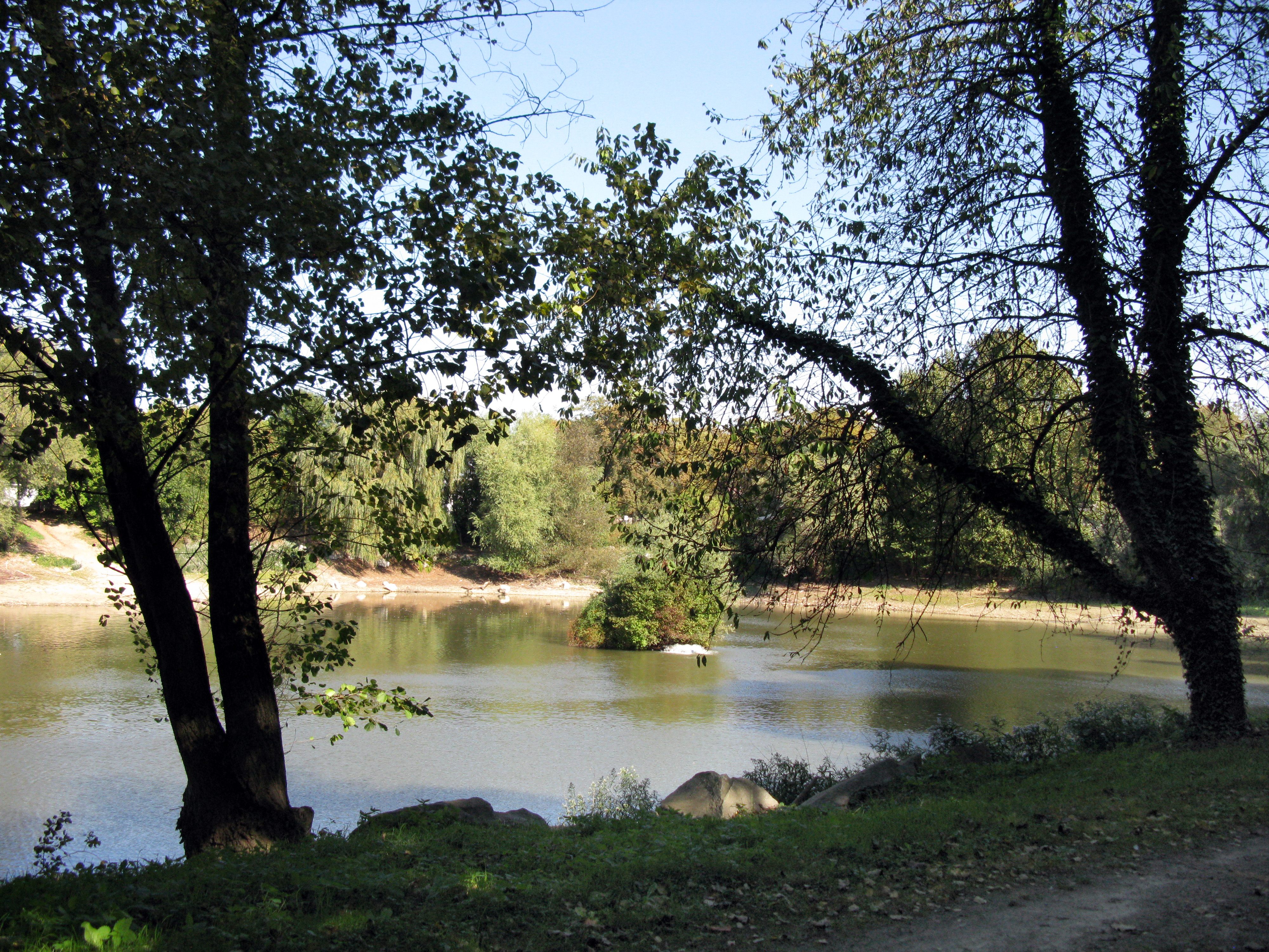 Wuhrlochpark in Neuenburg am Rhein mit schwimmender Insel